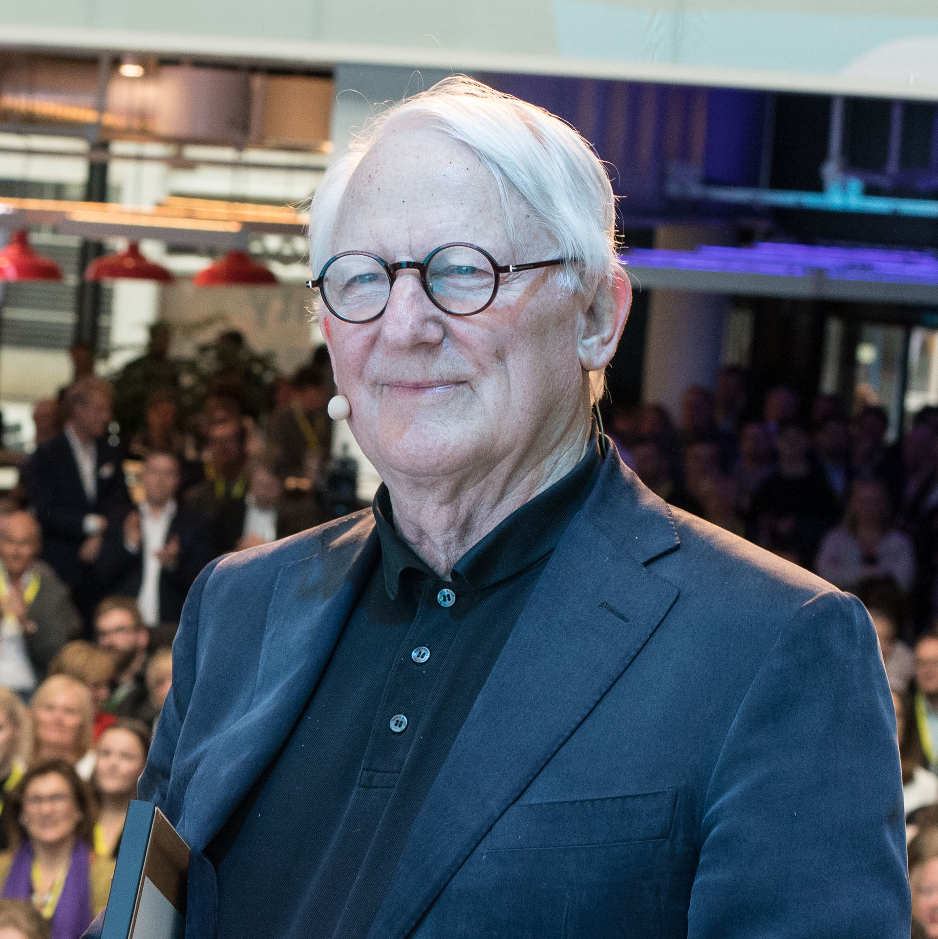 Nordiske Mediedager UNG 2018